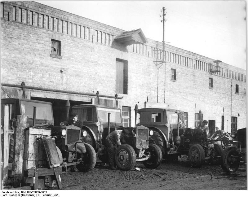 Einwinkel, Reparatur von Traktoren Zentralbild Rösener 8.2.1955 Vorbereitungen zur Frühjahrsbestellung auf der MTS Einwinkel, Bezirk Magdeburg Am 19. und 20.2.1955 findet in unseren Dörfern der "Tag der Bereitschaft" statt, an dem festgestellt wird, ob von der Landbevölkerung alle Vorbereitungen für eine erfolgreiche und termingerechte Frühjahrsbestellung getroffen wurden. Auf der MTS Einwinkel, Bezirk Magdeburg, sind die Kollegen mit den letzten Reparaturarbeiten beschäftigt. UBz: Bei schönem Wetter werden die letzten Reparaturen an den Traktoren auf dem Hof der MTS ausgeführt.